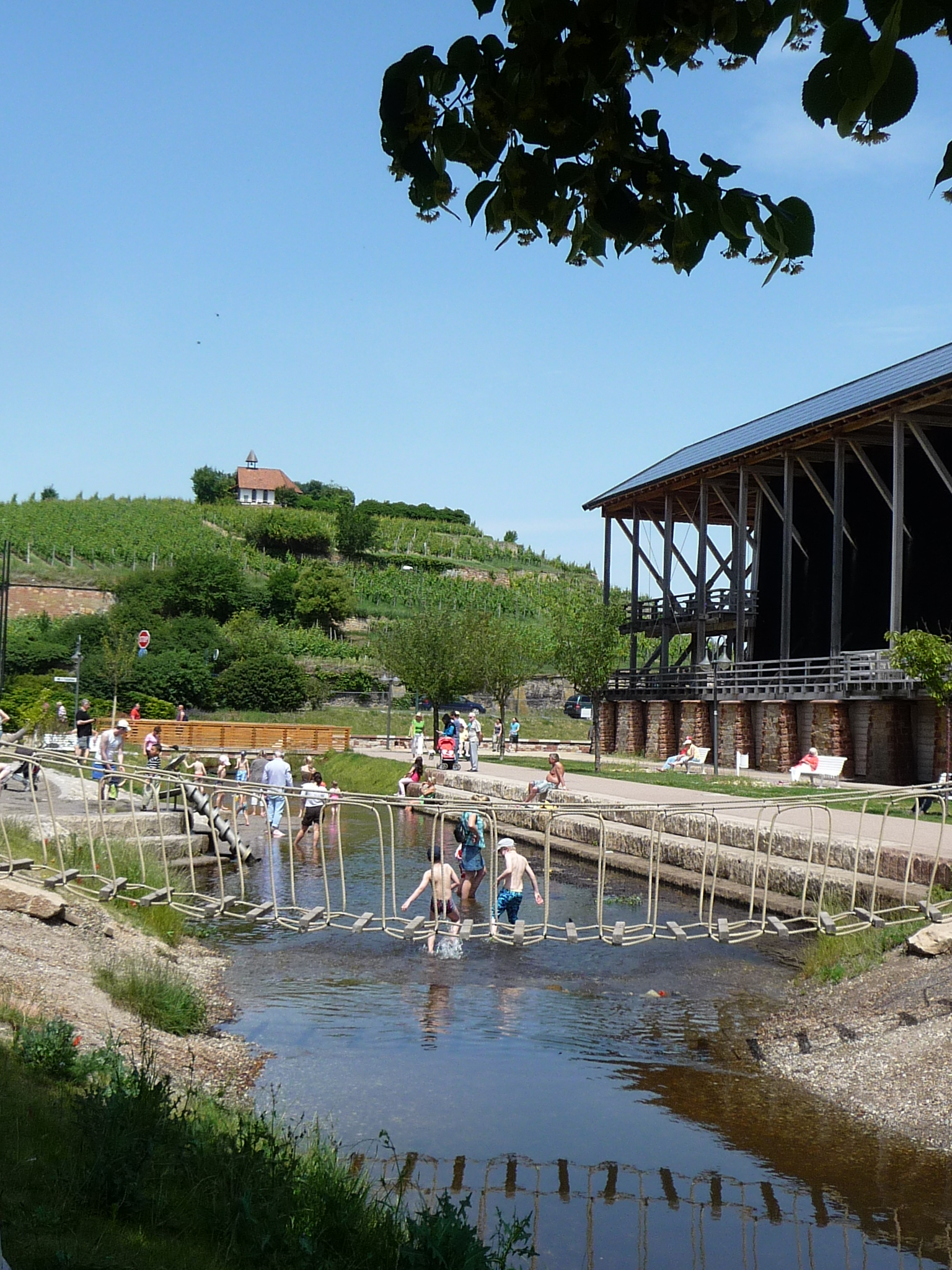 Isenach